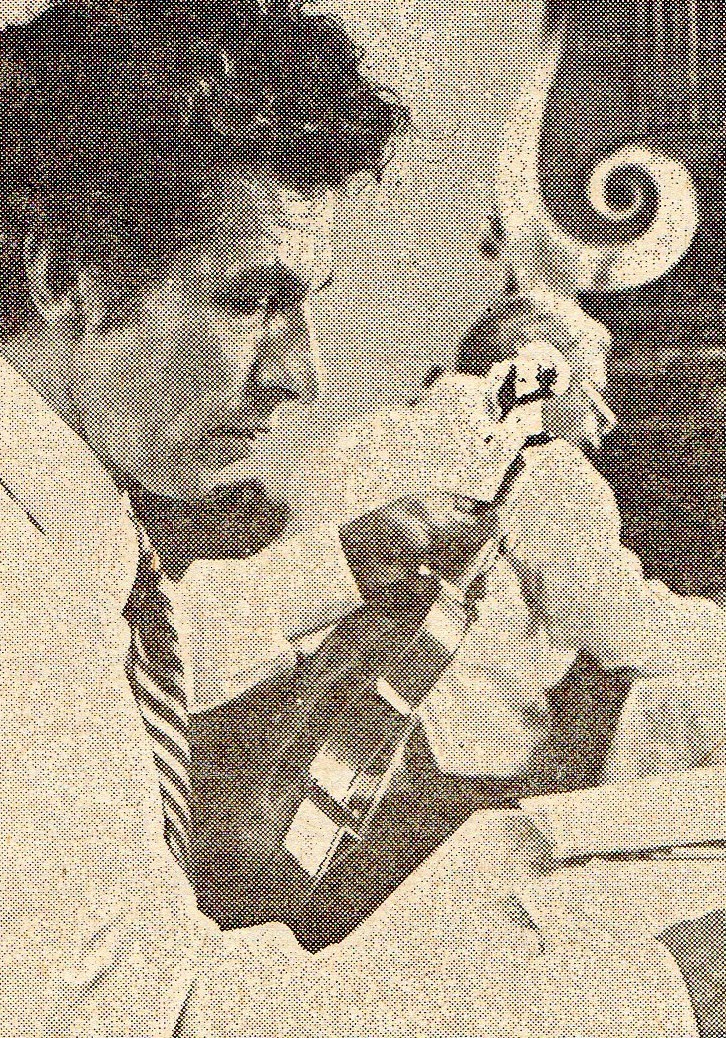 Gio-Batta Morassi ocenia skrzypce podczas Konkursu Lutniczego im. Wieniawskiego w Poznaniu w 1986r.